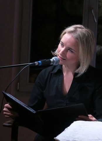 Maria Sanders bei einer Vorlesung